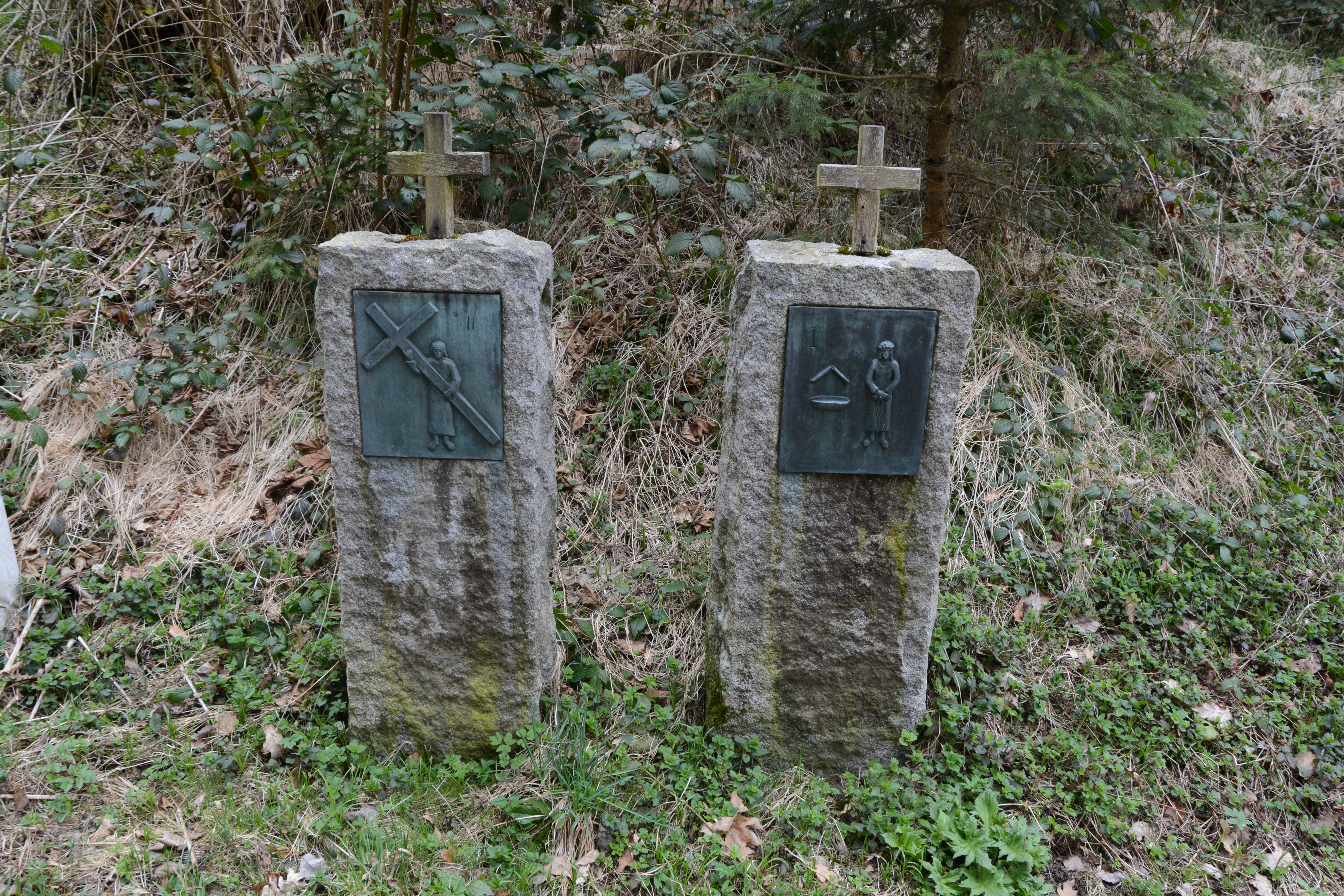 Wallfahrtskirche Maria Poetsch in der Gemeinde Altenfelden, Oberösterreich.